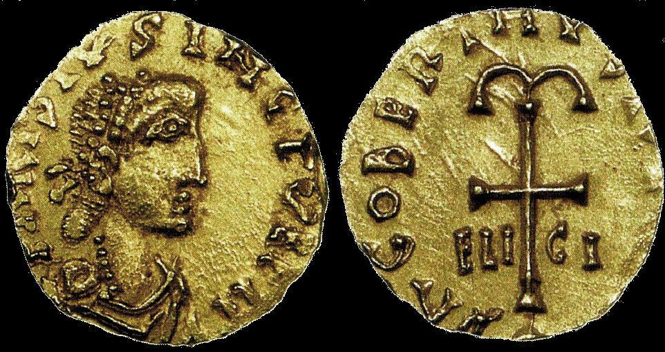 Tiers de sou d'or de Dagobert Ier. Avers : Effigie de Dagobert à droite, au diadème perlé. Revers : Croix ancrée, accostée des lettres ELI-CI.